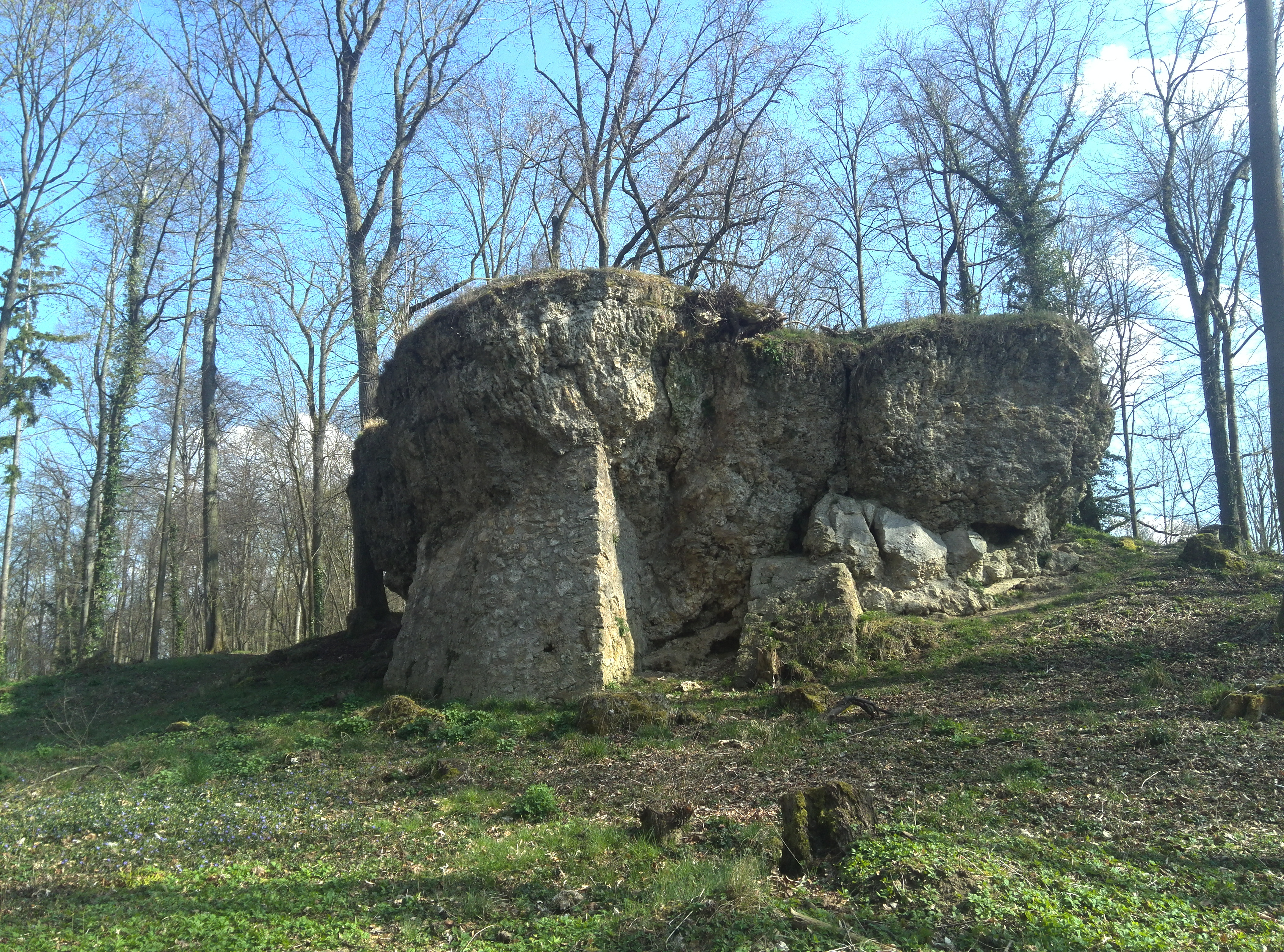 Hexenfelsen auf der Marienhöhe